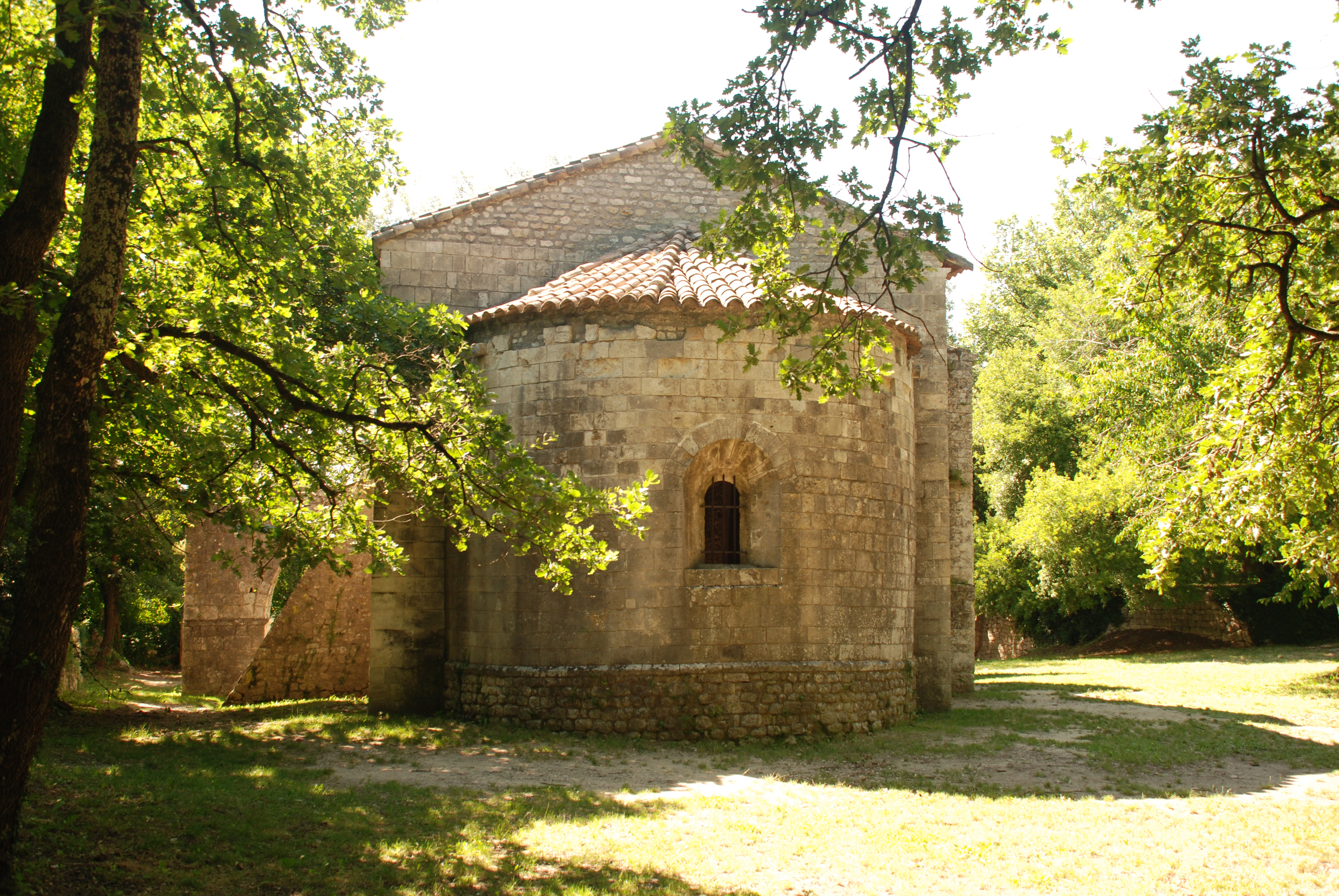 France - Drôme - La Garde-Adhémar - prieuré bénédictin du Val des Nymphes